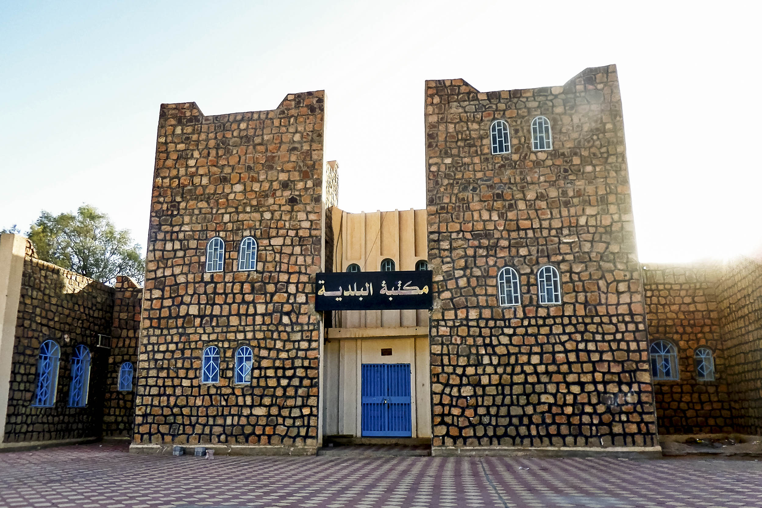 Djanet - Bibliothèque municipale مكتبة البلدية - جانت